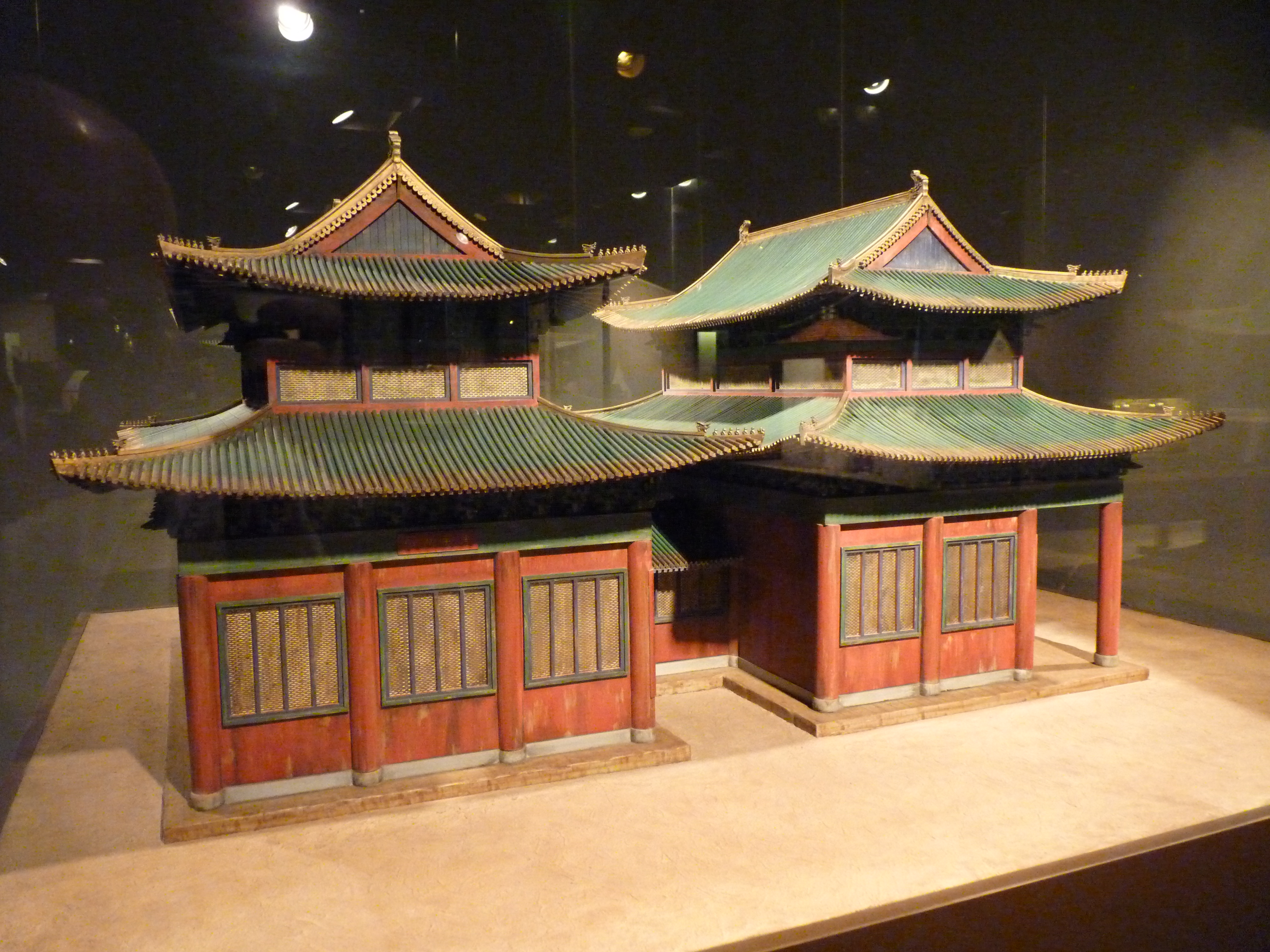 P1100468 Tel Aviv-Yafo